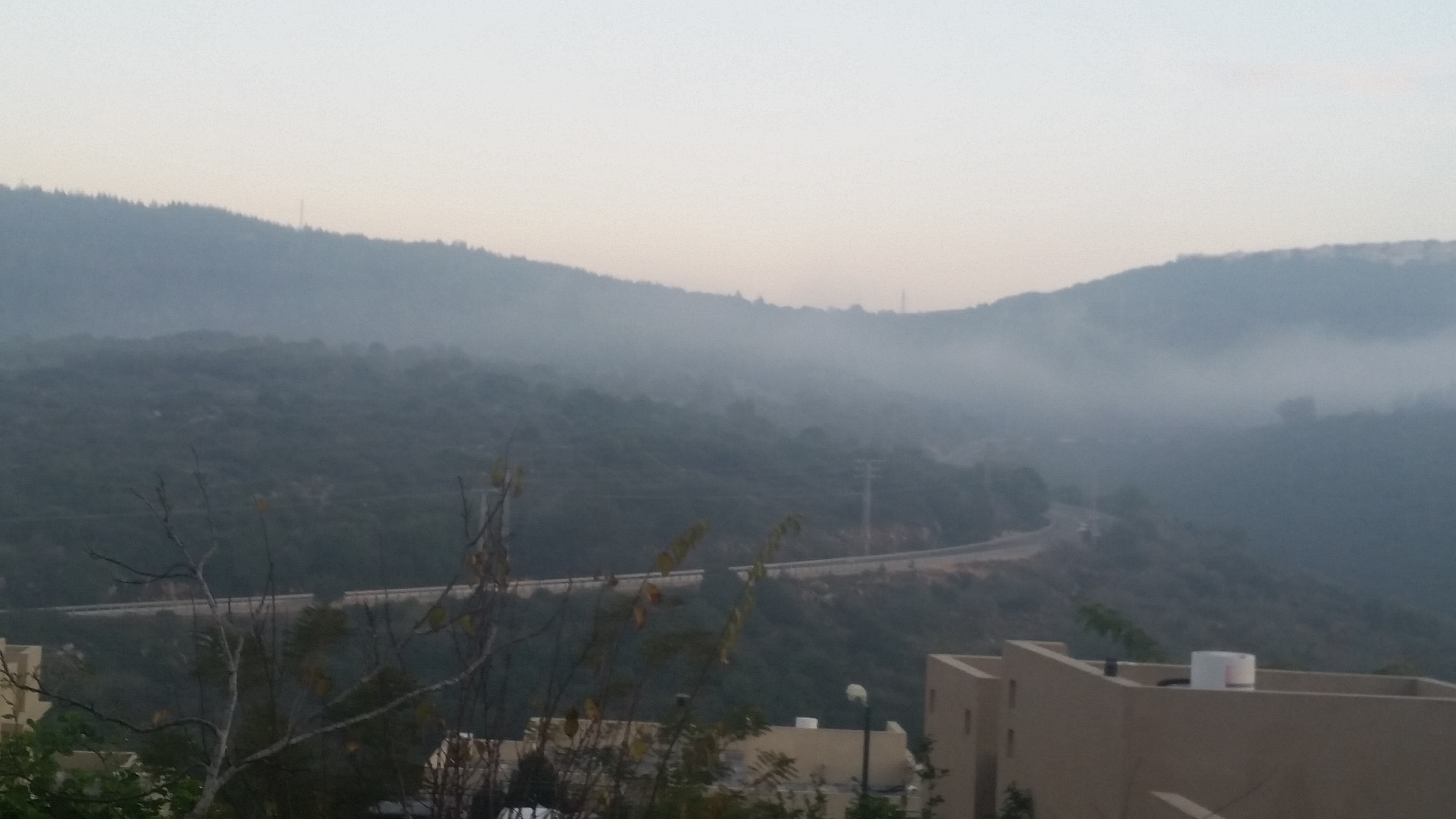 כביש 784 בקטע היורד מצומת יודפת לצומת רקפת. צילום לכיוון מזרח מרקפת.